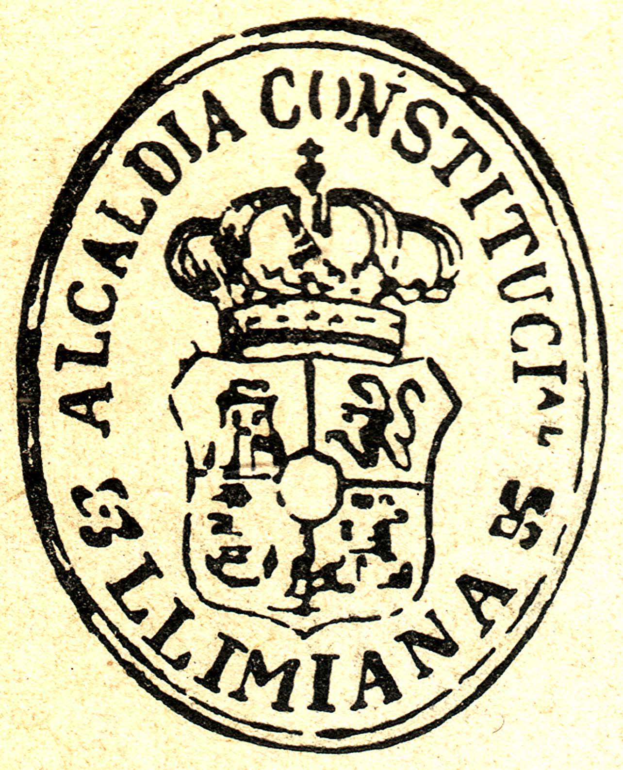 Segell municipal de Llimiana de vers el 1900 (Pallars Jussà)